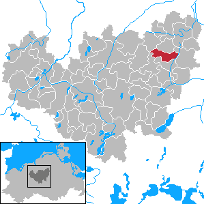 Schwasdorf in Mecklenburg-Vorpommern - District Güstrow